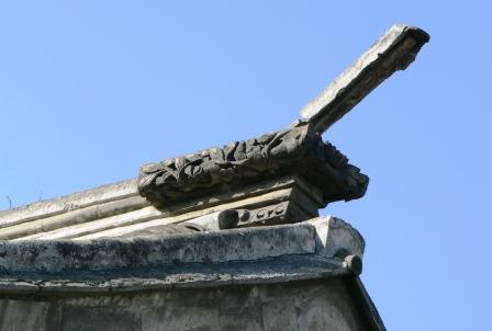 蝎子尾 拍摄